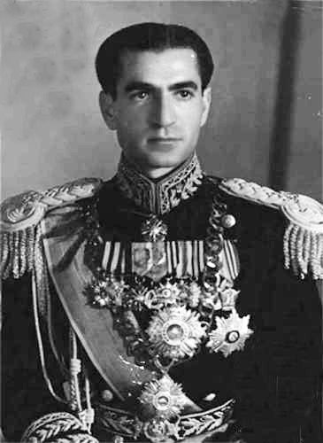 Mohammad Reza Chah Pahlavi, Shahanshah d'Iran, au début des années 1950